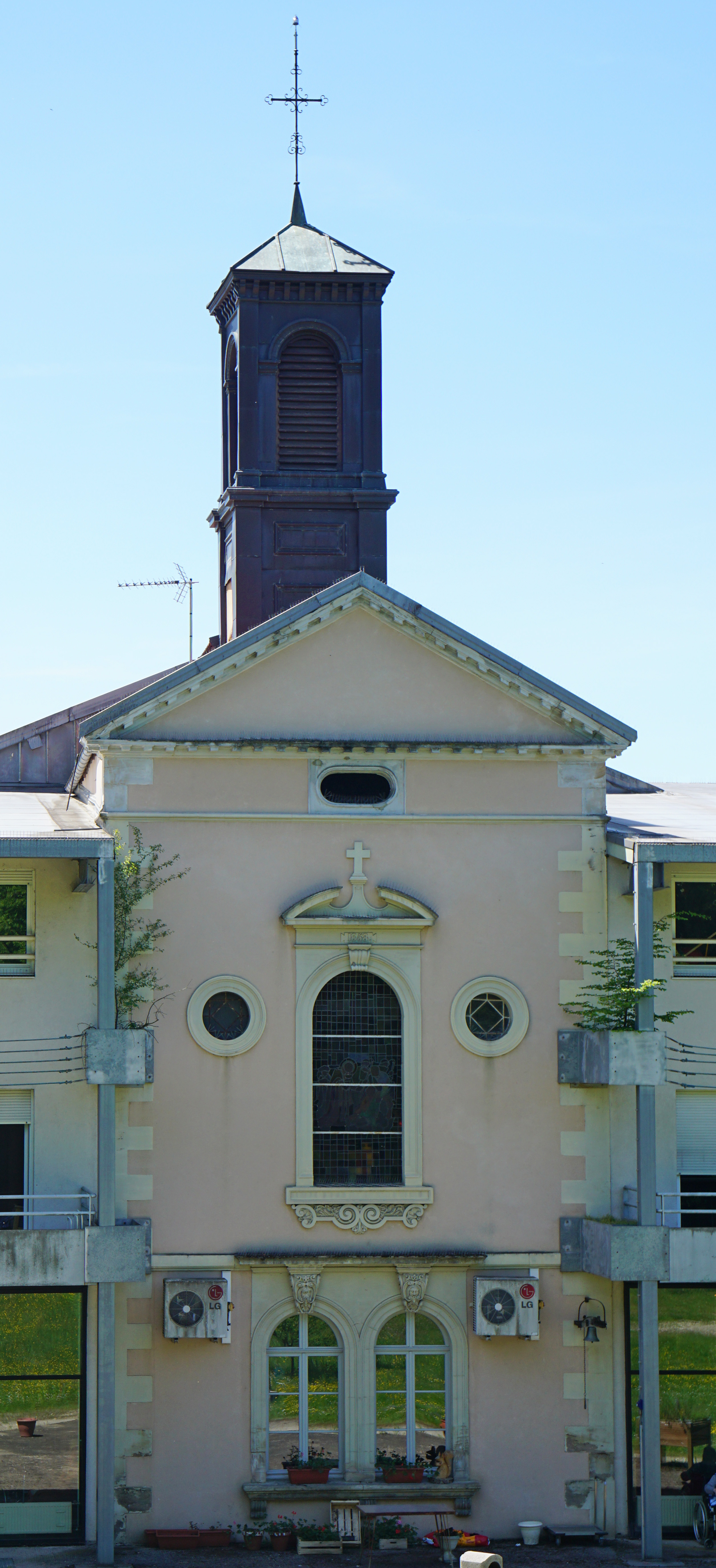 Vue arrière de la chapelle de l'Hospice Marie-Richard à Lure.